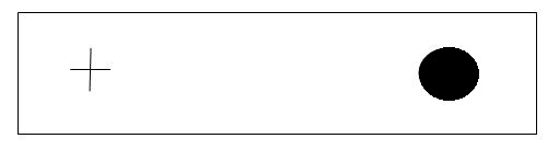 Kartonik służący do wykonania doświadczenia Mariotte'a.